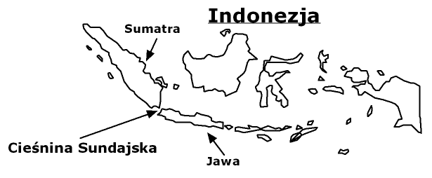 Cieśnina Sundańska